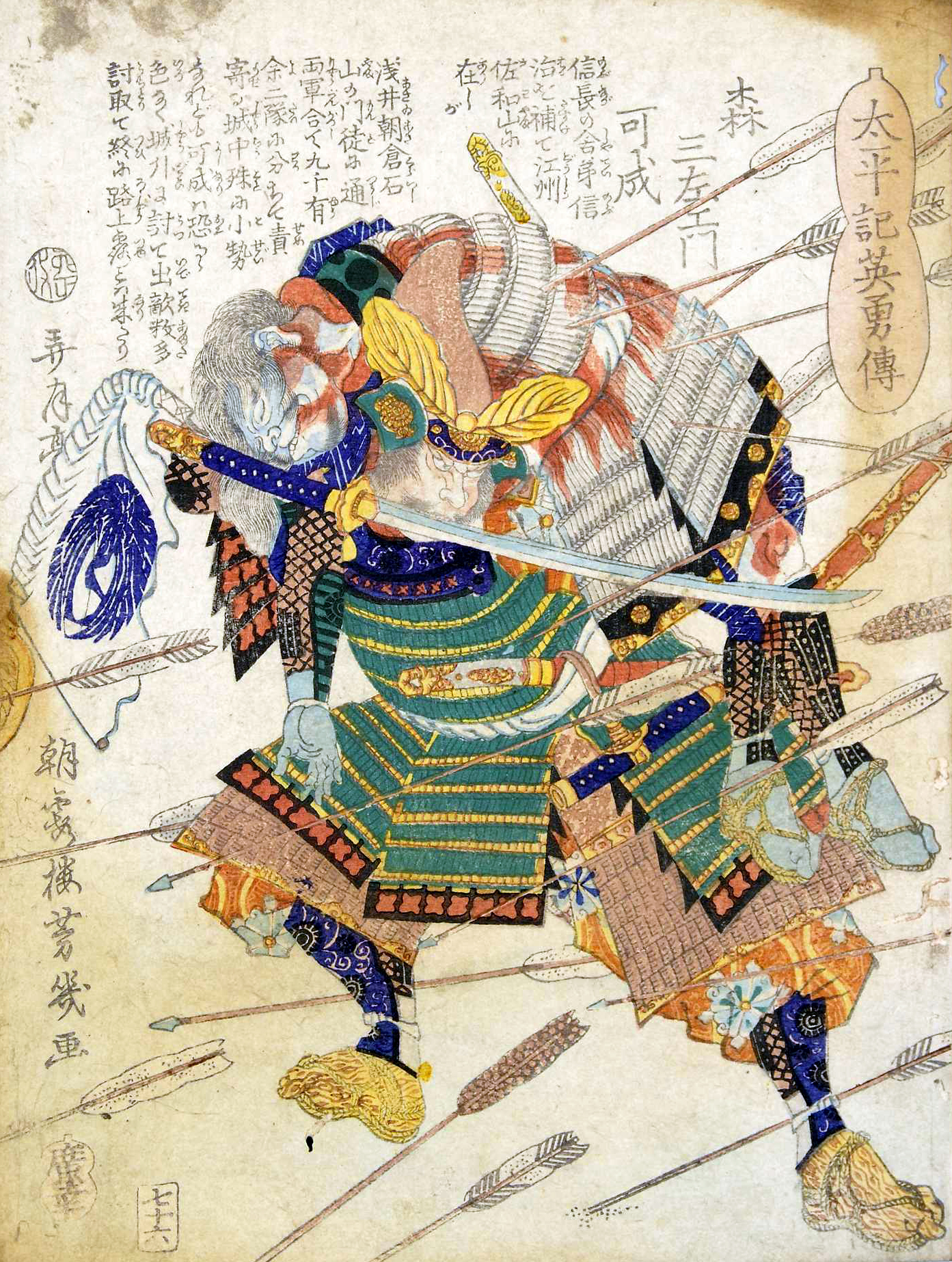 「太平記英勇伝七十六：森三左エ門可成」 1867年